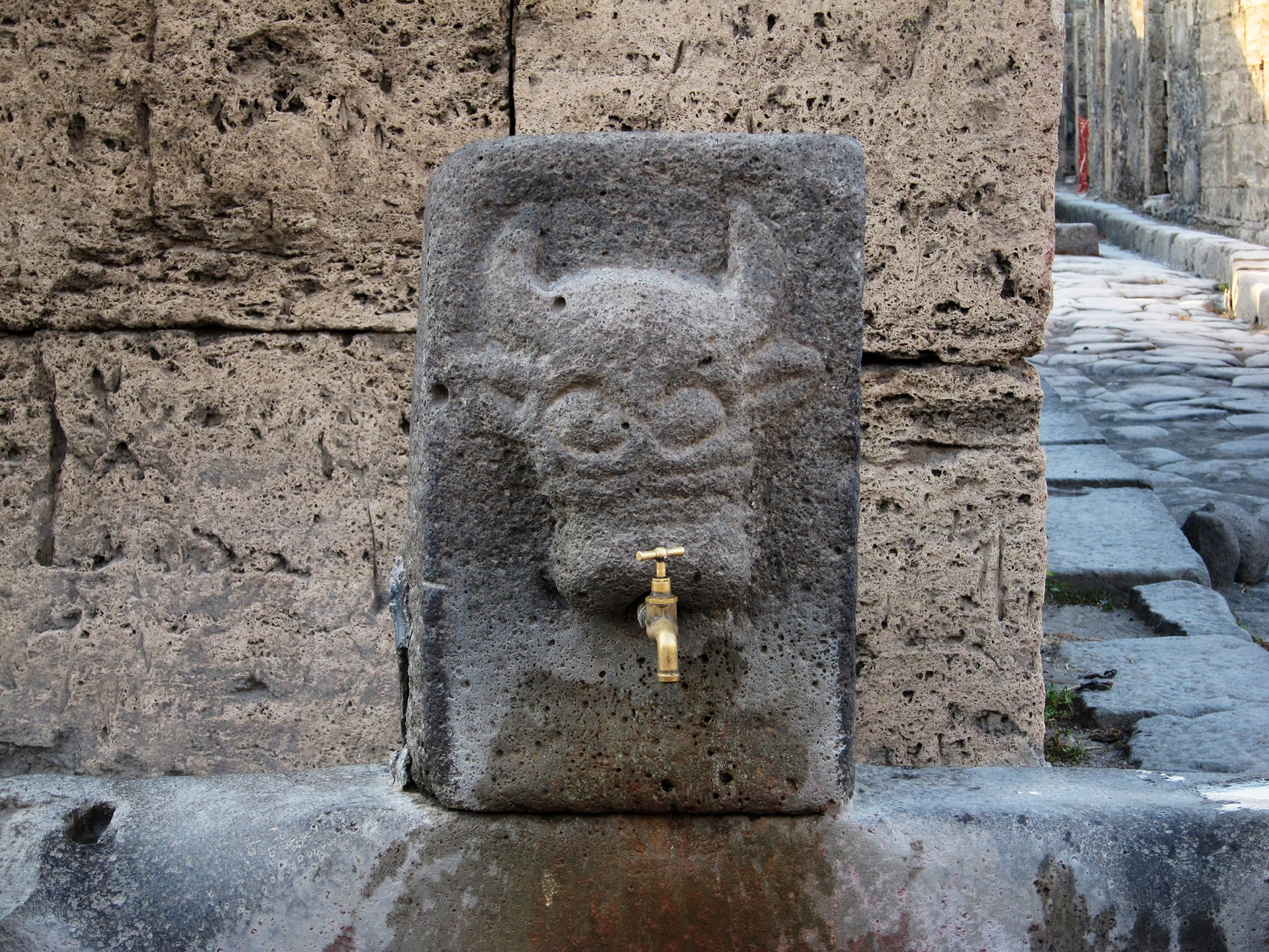 Une fontaine à Pompei (Italie).